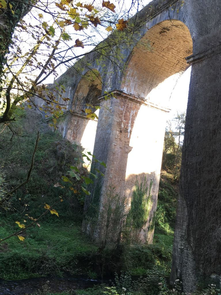 Ponte de Cruzul